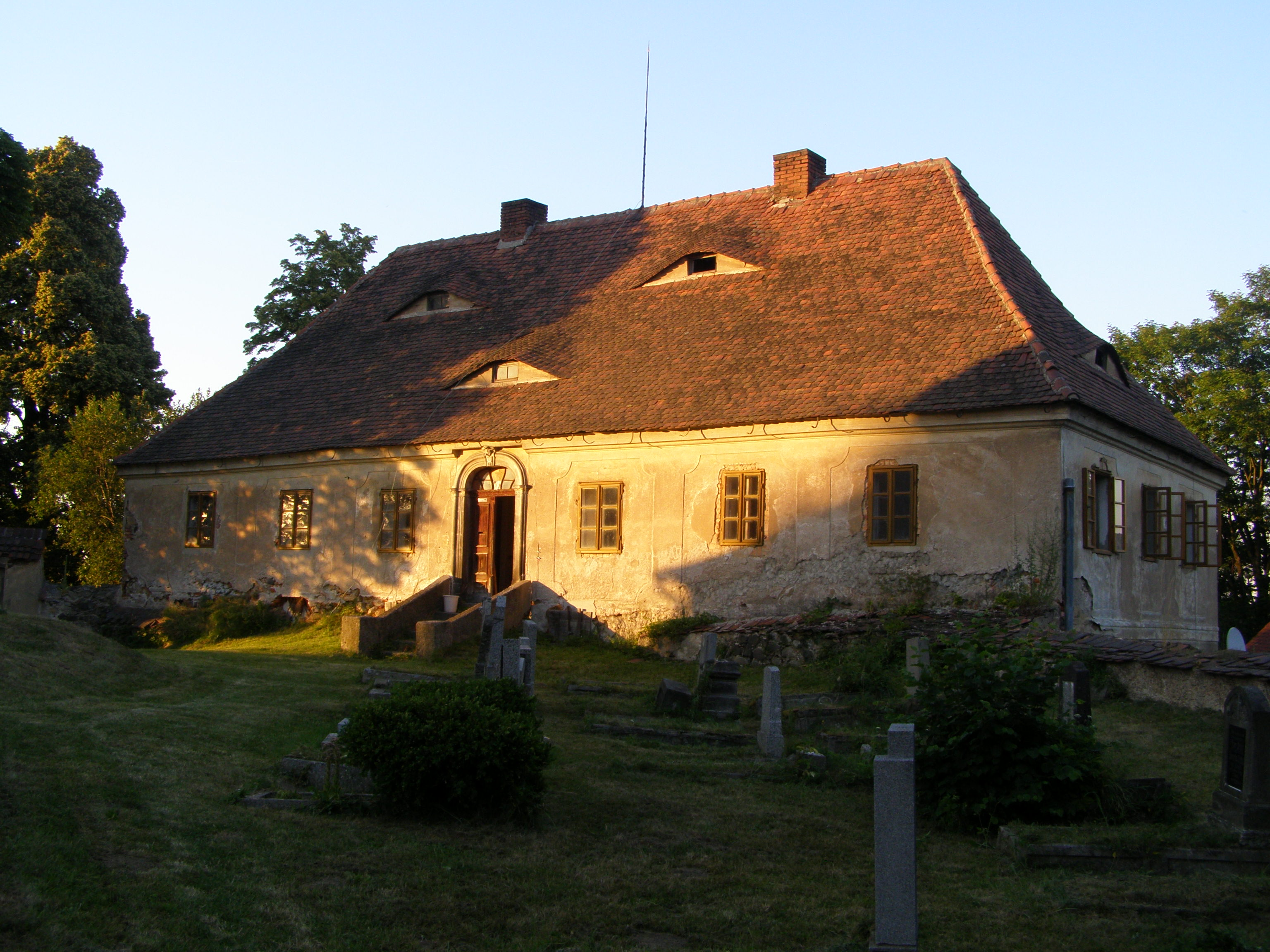 Černousy, část Ves, fara (pohled od jihozápadu) a hřbitov